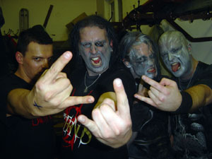 Corn, Paramba, Khaablus & Igor